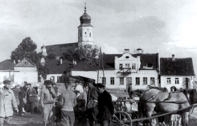 Беларуская (тарашкевіца): Слонім (Słonim), рог пляцу Рынак (plac Rynak) і вуліцы Бэрнардынскай (vulica Bernardynskaja)